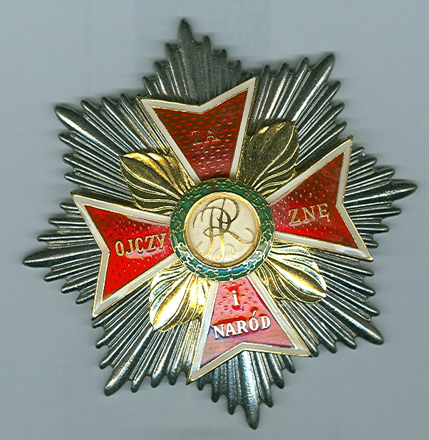 Zilveren ster van de Orde van de Witte Adelaar van Polen. Eigen verzameling, Groningen.